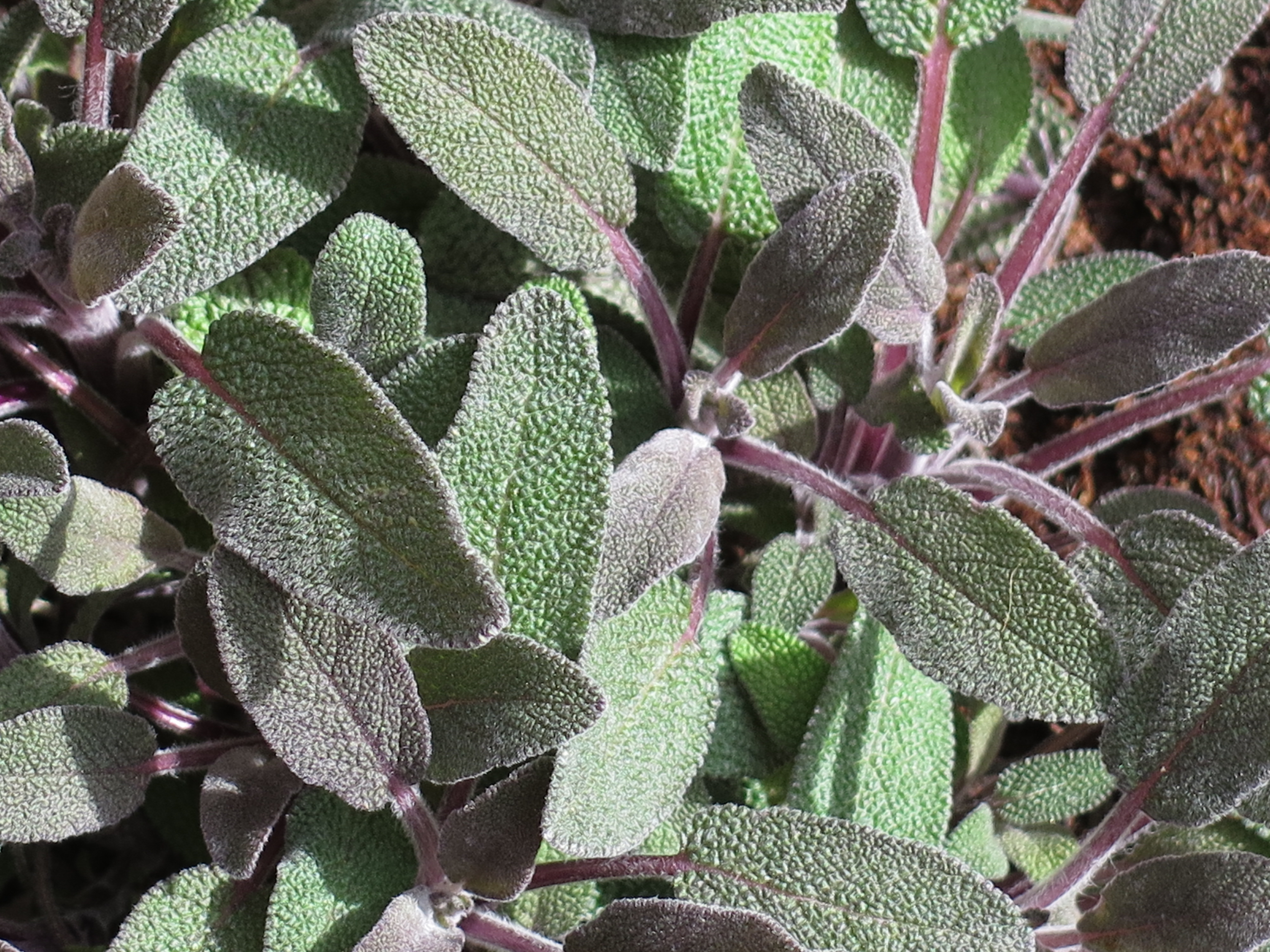 Salvia officinalis 'Purpurascens'